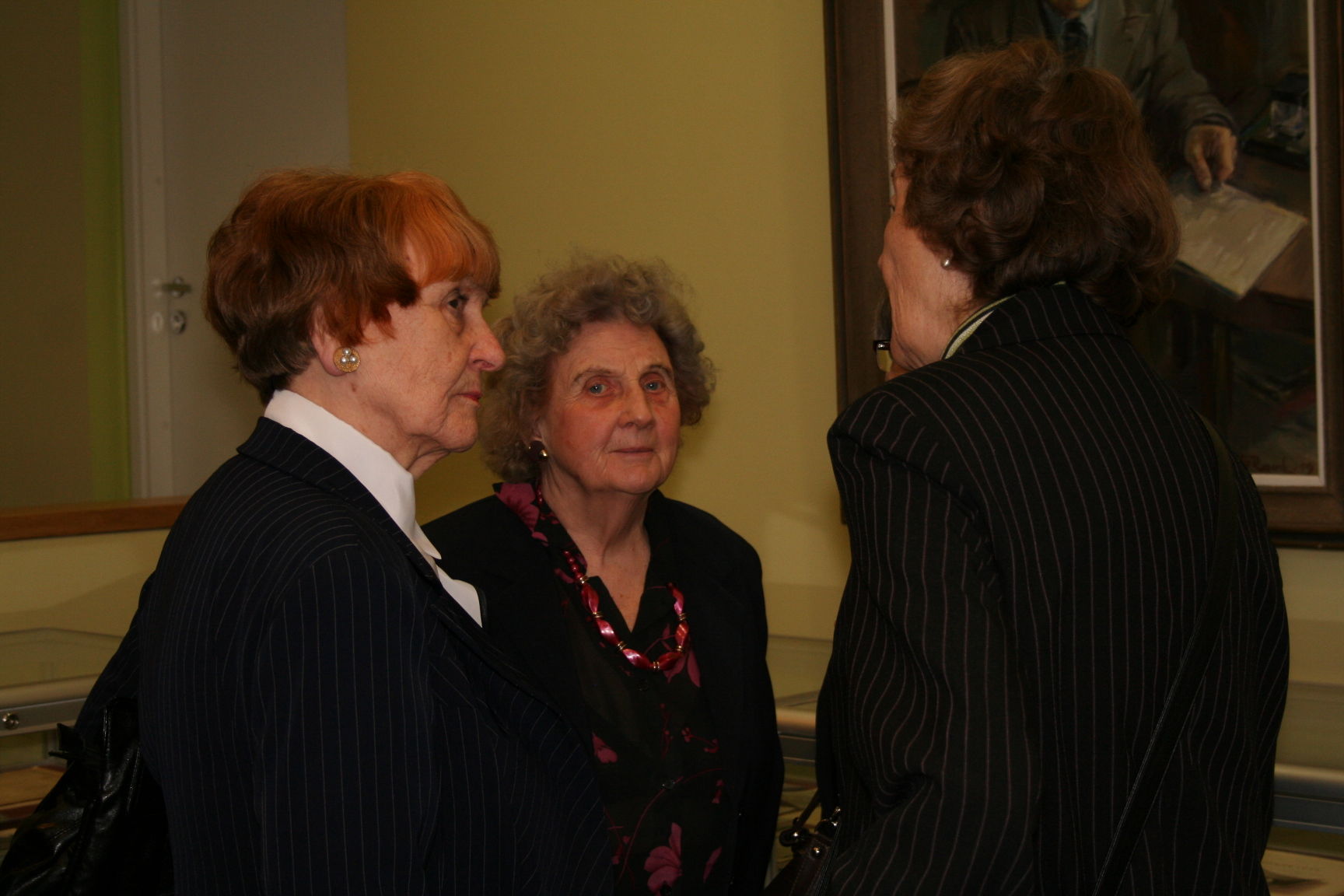 Olivia Saar ja Helle Michelson Kirjanike Liidu üldkogul Tartus 23. märtsil 2012.